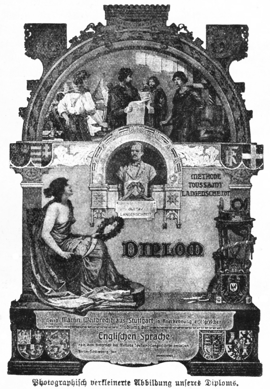 Beispielabbildung des Sprachdiploms nach der Methode Toussaint-Langenscheidt (im Original mehrfarbig)